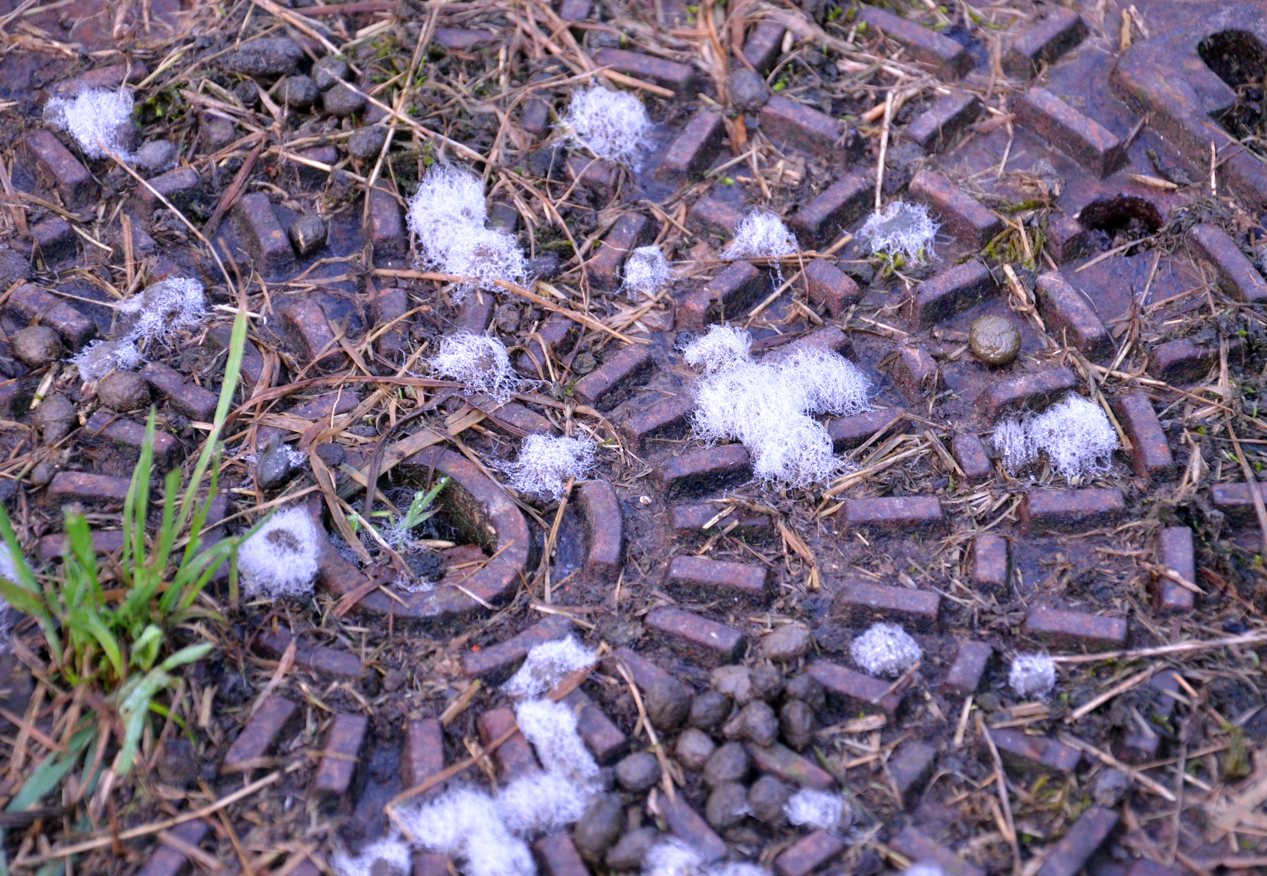 Petit champignon coprophile sur excréments de lapins, Automne 2012, bois de la Citadelle, Lille